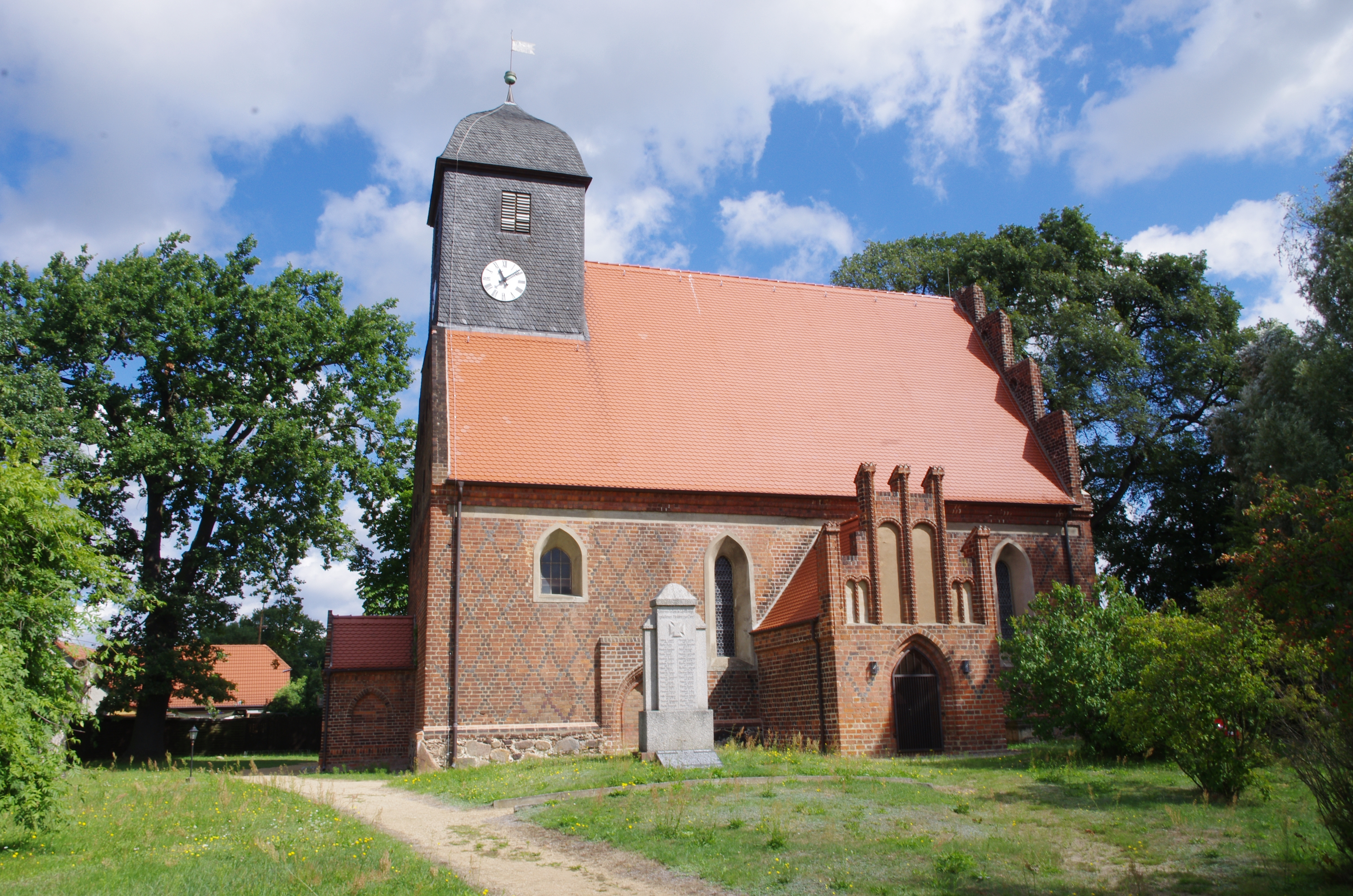 Briesen (Spreewald) in Brandenburg, Landkreis Spree-Neiße. Die Kirche ist denkmalgeschützt.